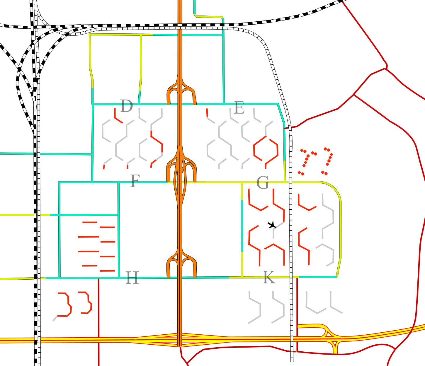 De rode flats op de kaart tonen aan welke Bijlmerflats tot op heden nog overeind staan. De grijze flats zijn inmiddels gesloopt en (in de meeste gevallen) vervangen voor nieuwbouw. (deze kaart toont de situatie aan van September 2012)